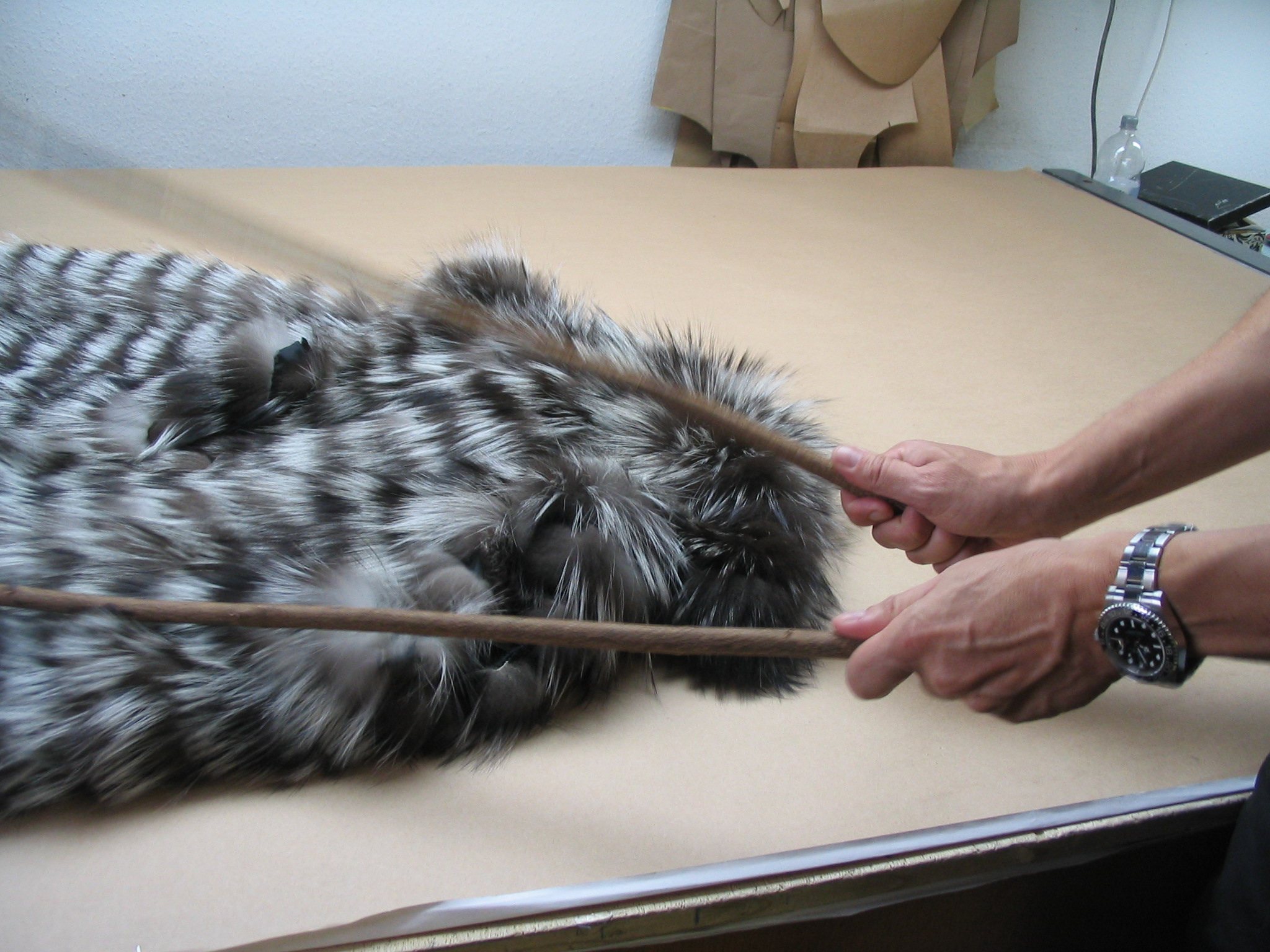 Klopfen eines galonierten Silberfuchspelzes mit Haselnussstöcken. Gesehen im Pelzatelier Halfmann, Düsseldorf-Oberkassel.